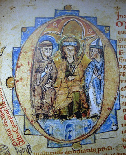 sv. Vojtěch, Václav a Prokop v iniciále O z Algoritmus, München, Clm. 17703